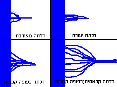 שרטוט של סוגי דלתות שונות.